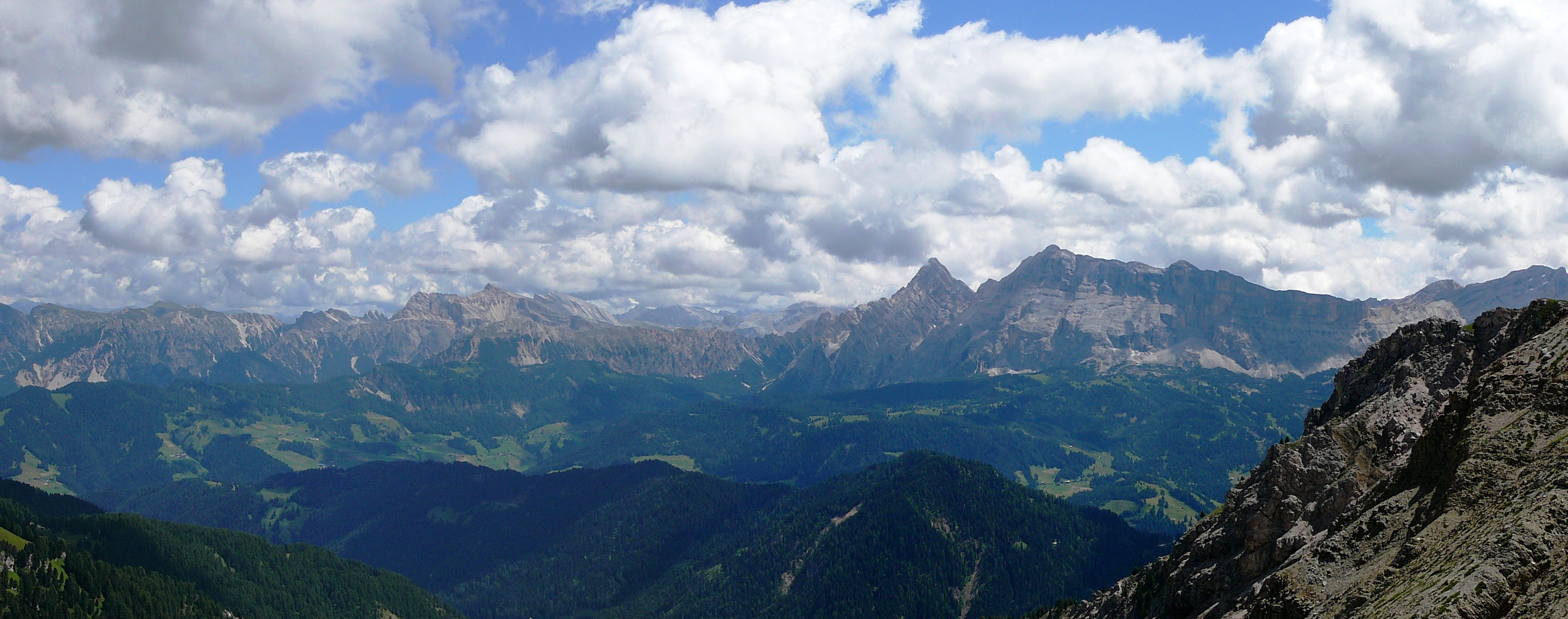 Le cime dolomite al confine ovest del parco di fanes